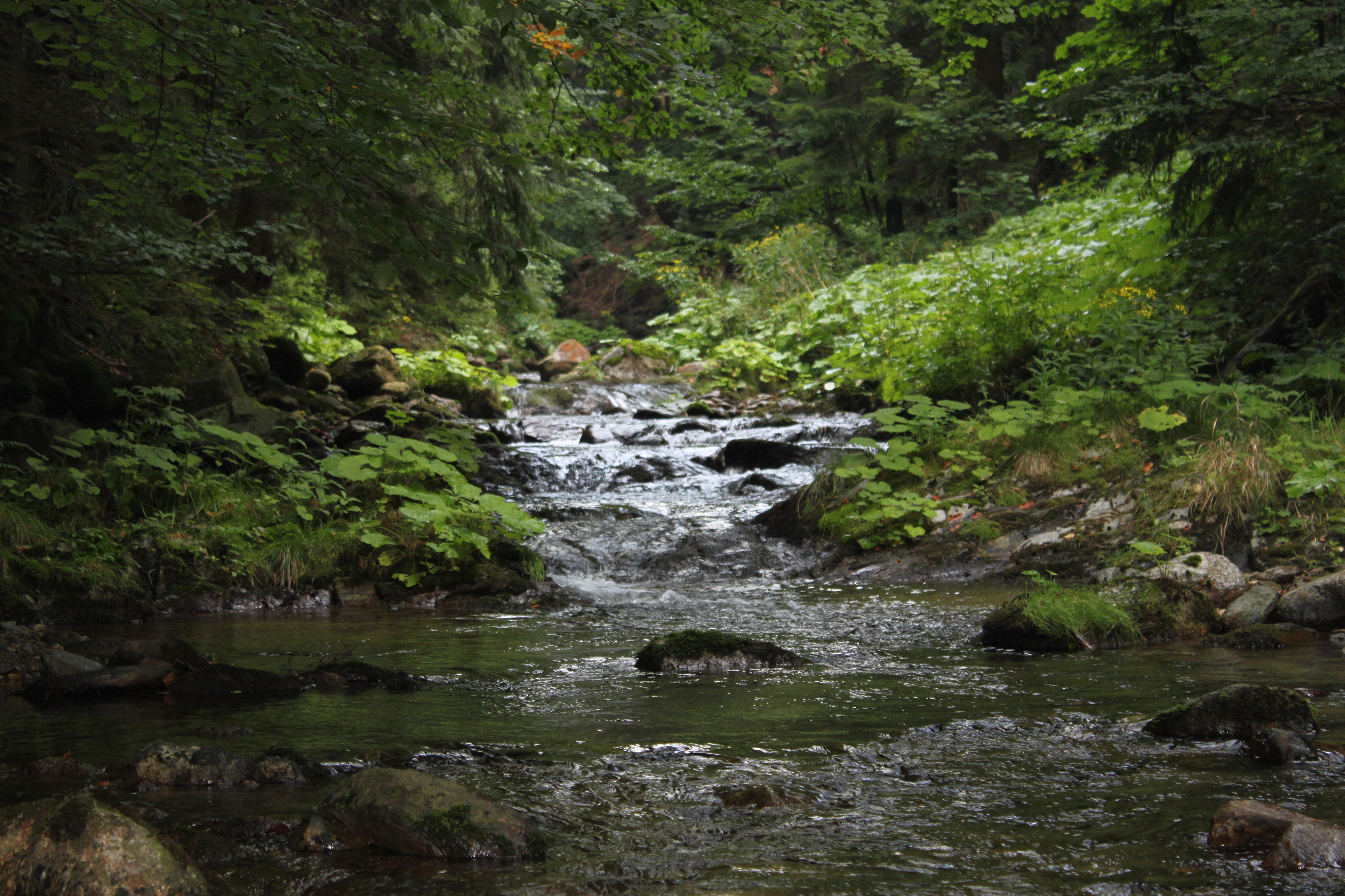 Vítkovice, Czech Republic